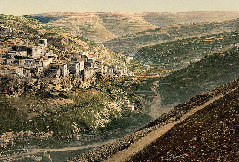 כפר סילואן בסוף האמה ה-19